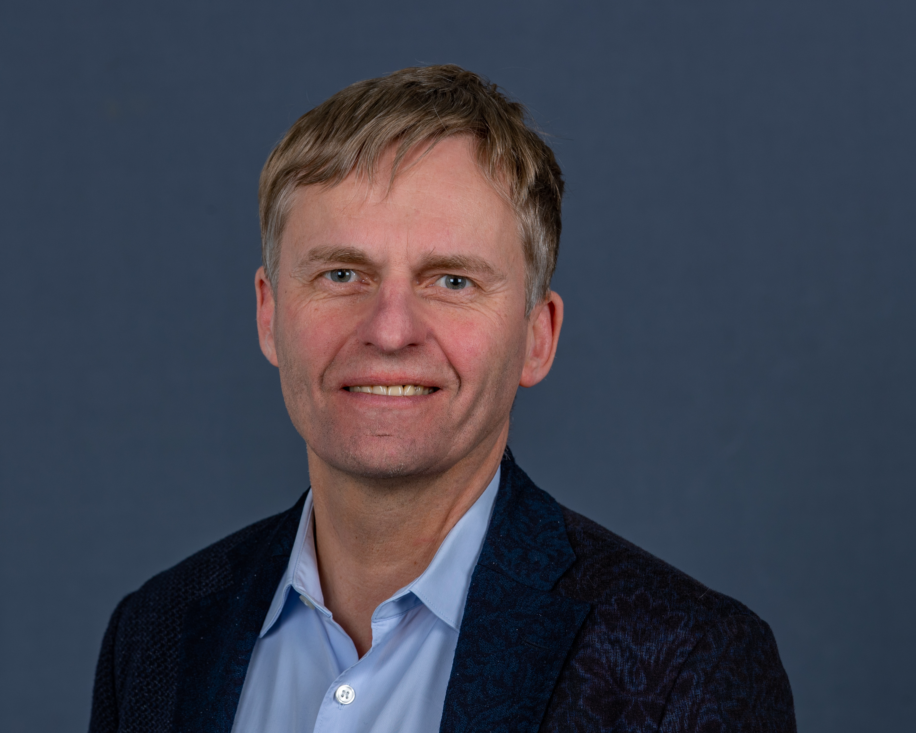 Rüdiger Kruse, CDU